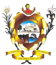 Escudo del municipio Ribero. Estado Sucre. Venezuela